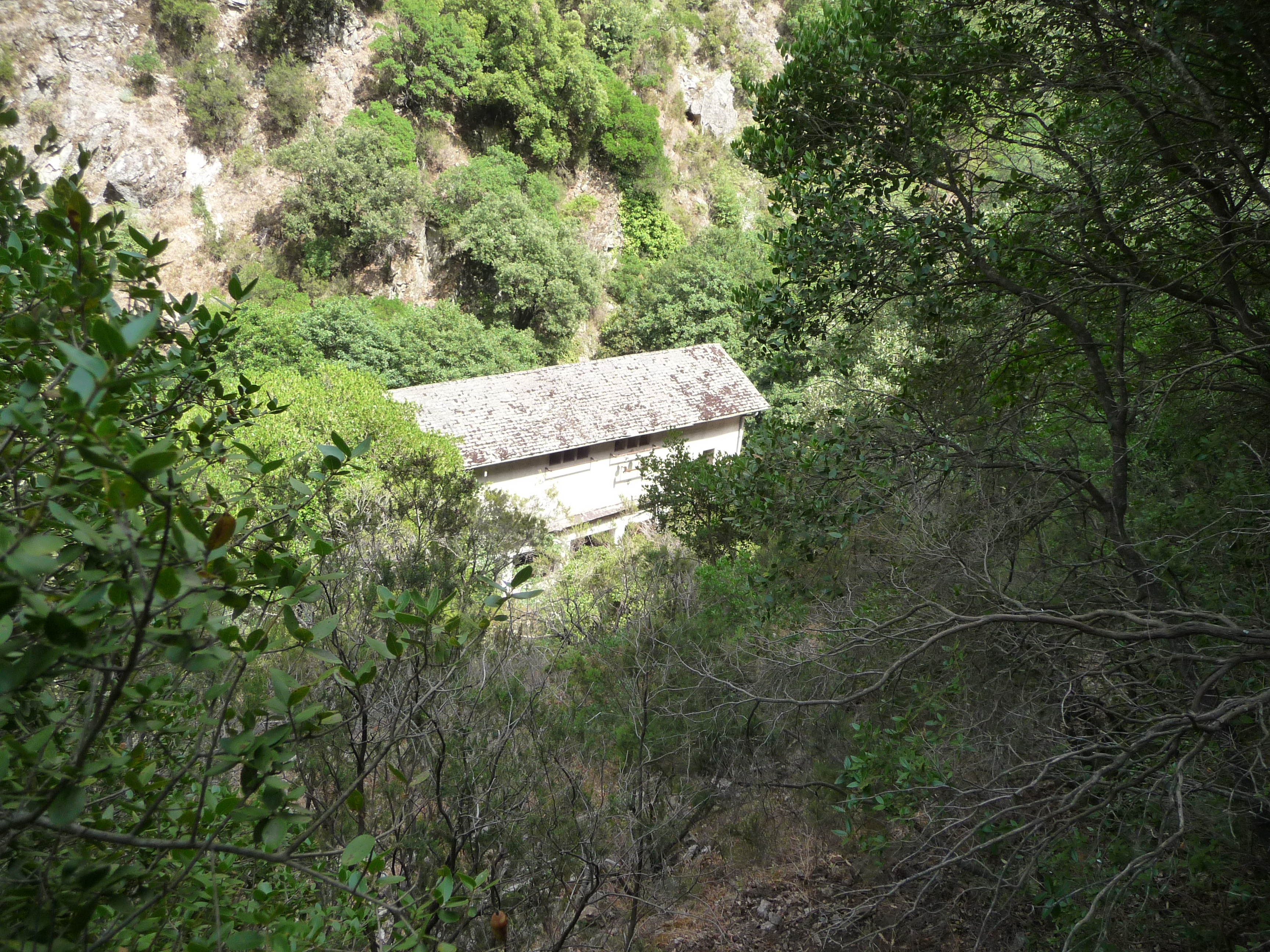 Centralina idroelettrica marmarico dall'alto (2011)